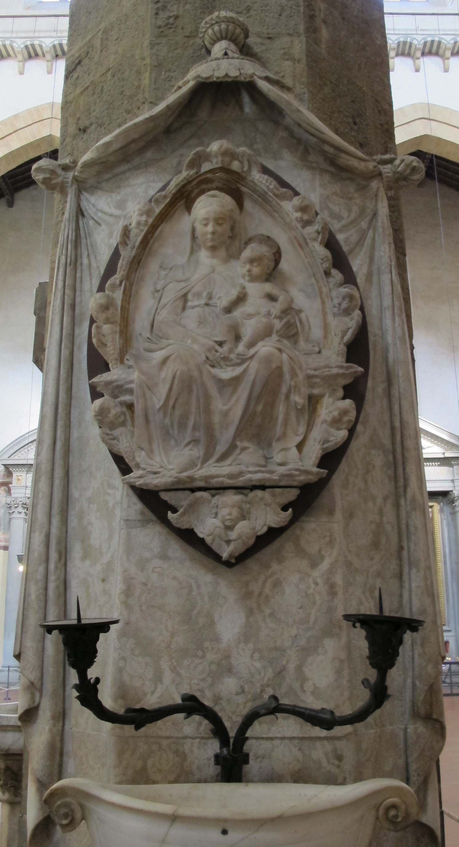 Tomba di francesco nori, Madonna del Latte di Antonio Rossellino (1478) 2